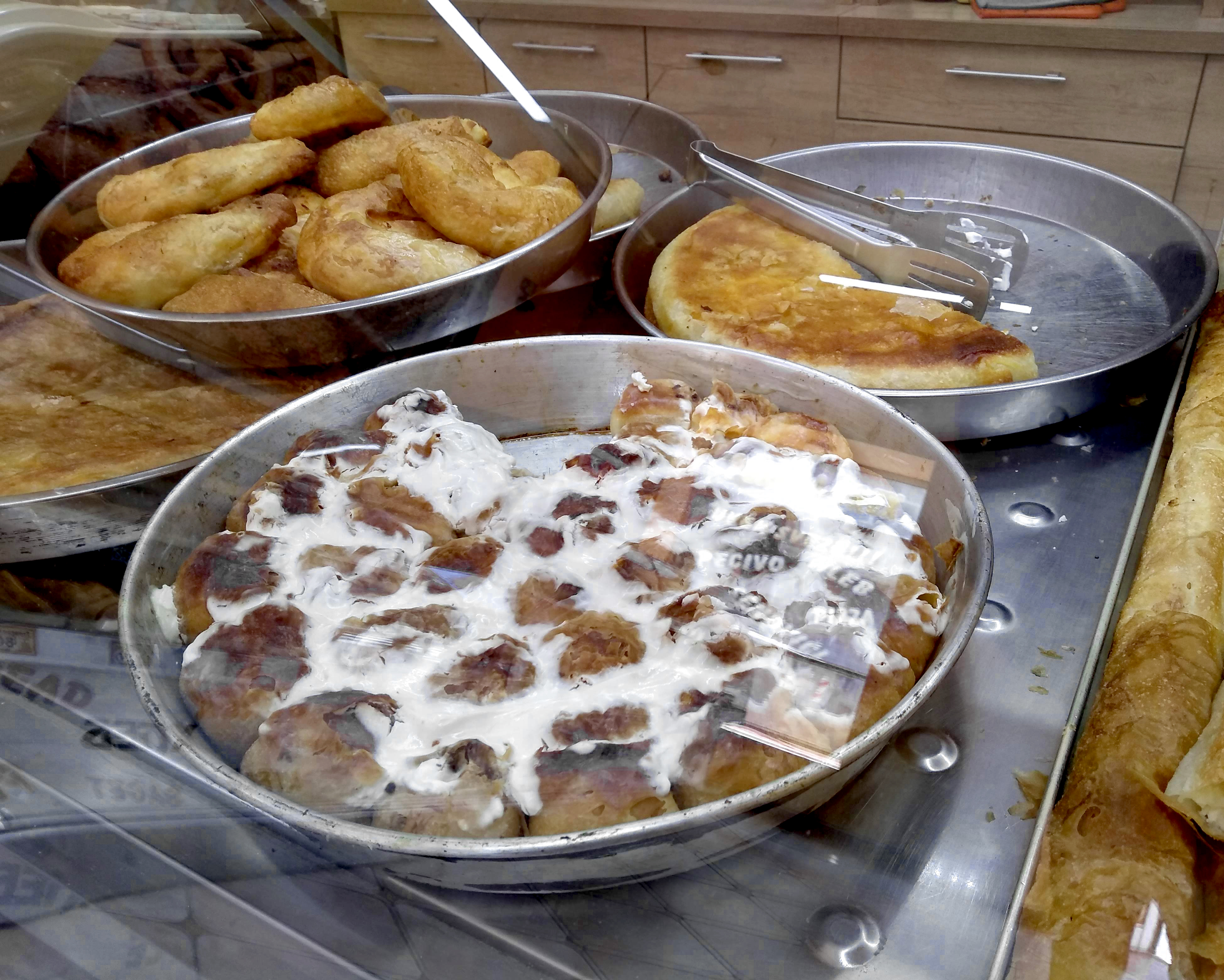 Srpski (latinica): Pazarske mantije - tradicionalno pripremljene, sa prelivom od jogurta